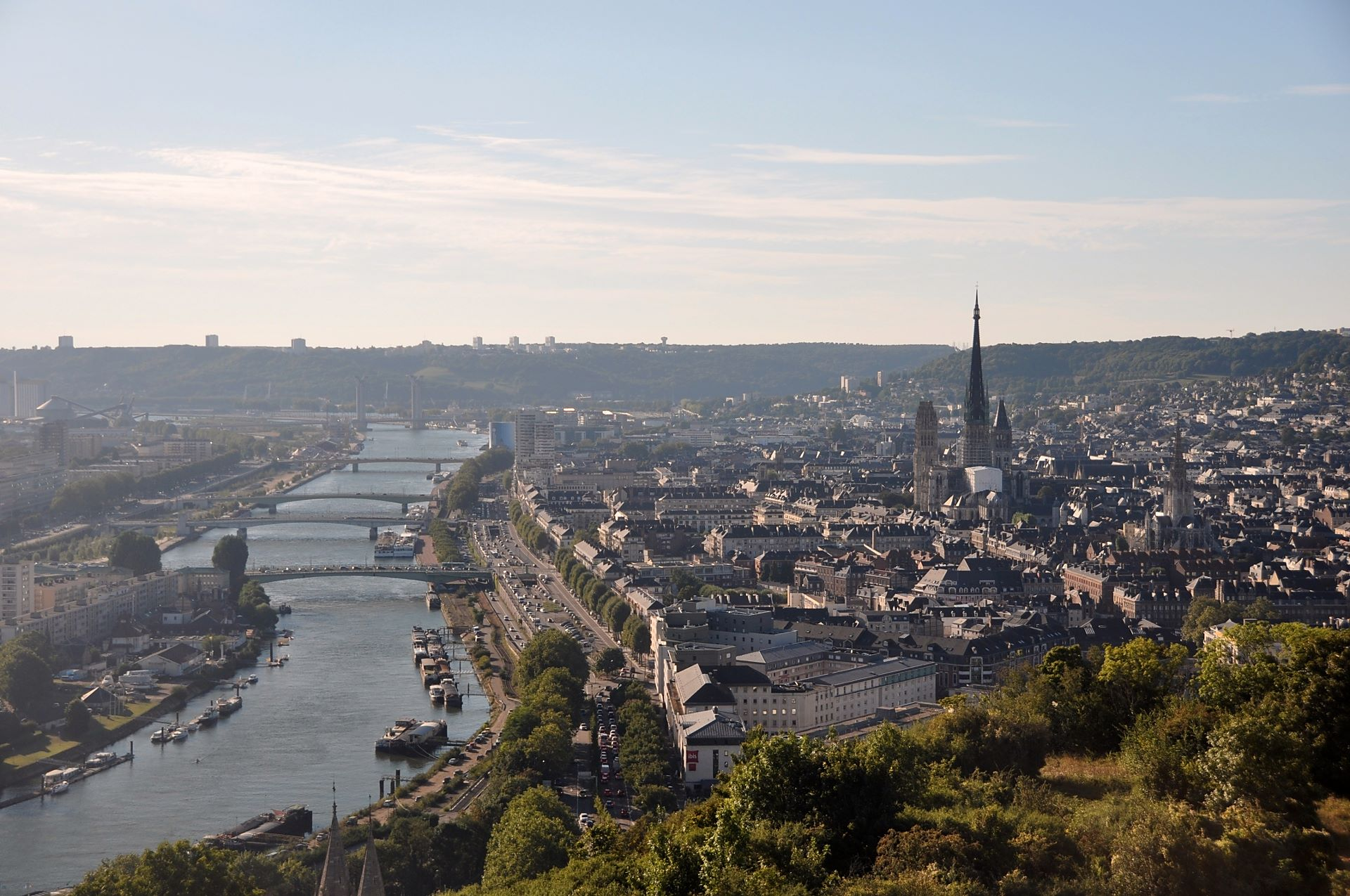 Rouen